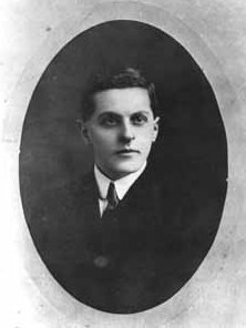 Ludwig Wittgenstein in his youth.